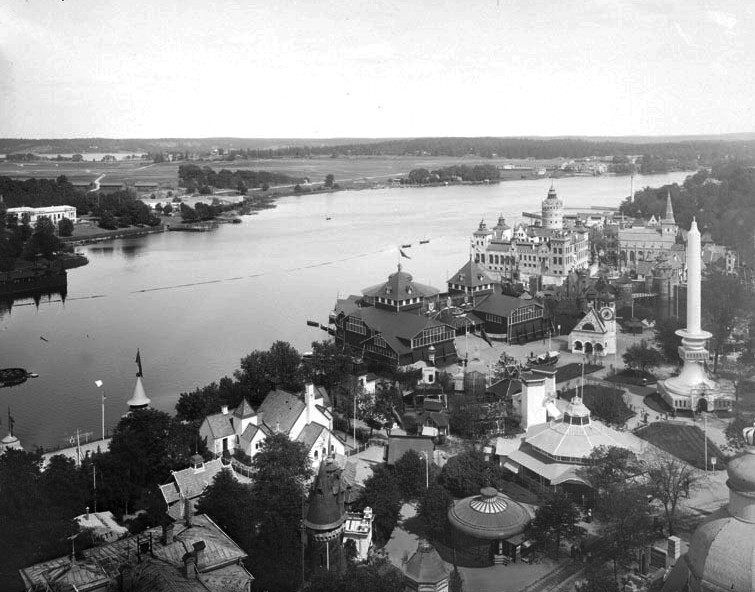 Utsikt från minareterna över 1897 års Allmänna konst- och industriutställning på Djurgården. "Liljeholmens" stora stearinljus syns till höger.